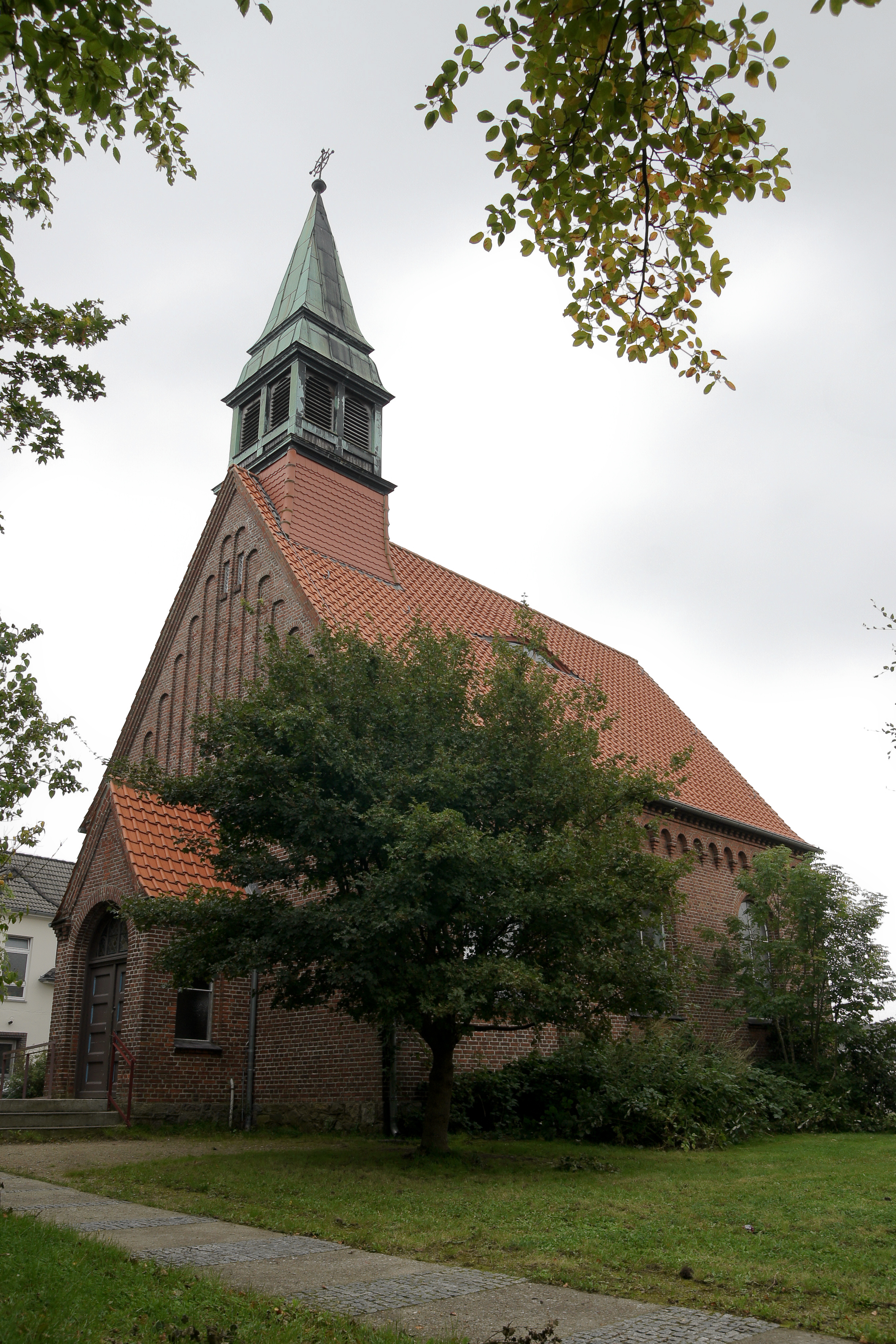 Die Heilands-Kapelle in Flensburg-Weiche, Denkmal-Nr.: 3. Südwest-Seite, Blickrichtung nach Nordosten auf den Haupteingang.